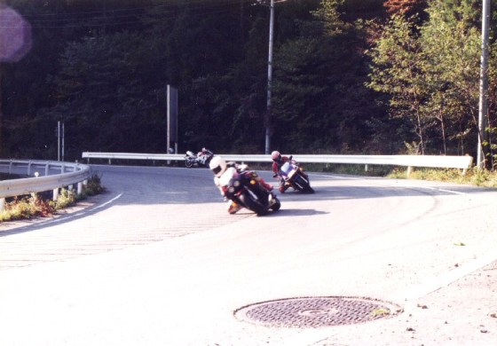 道坂トンネルのローリング族